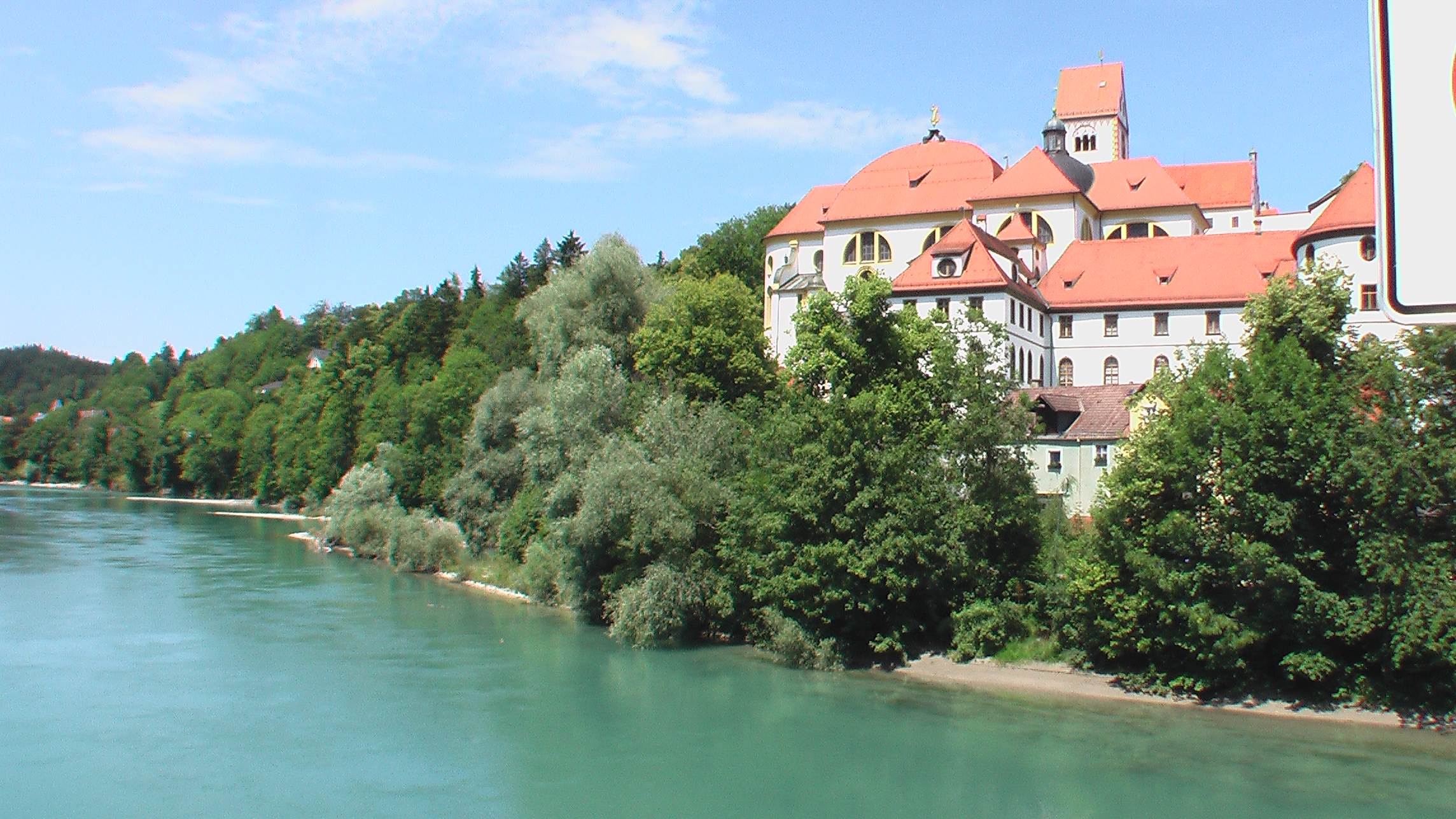 Füssen / Ansicht vom Fluß Lech